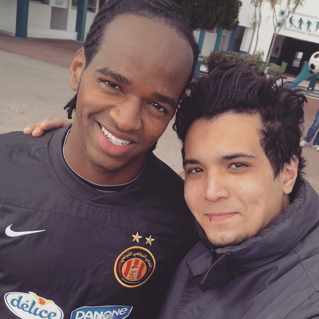 Photo de moi juxtaposant le joueur brésilien Cruz